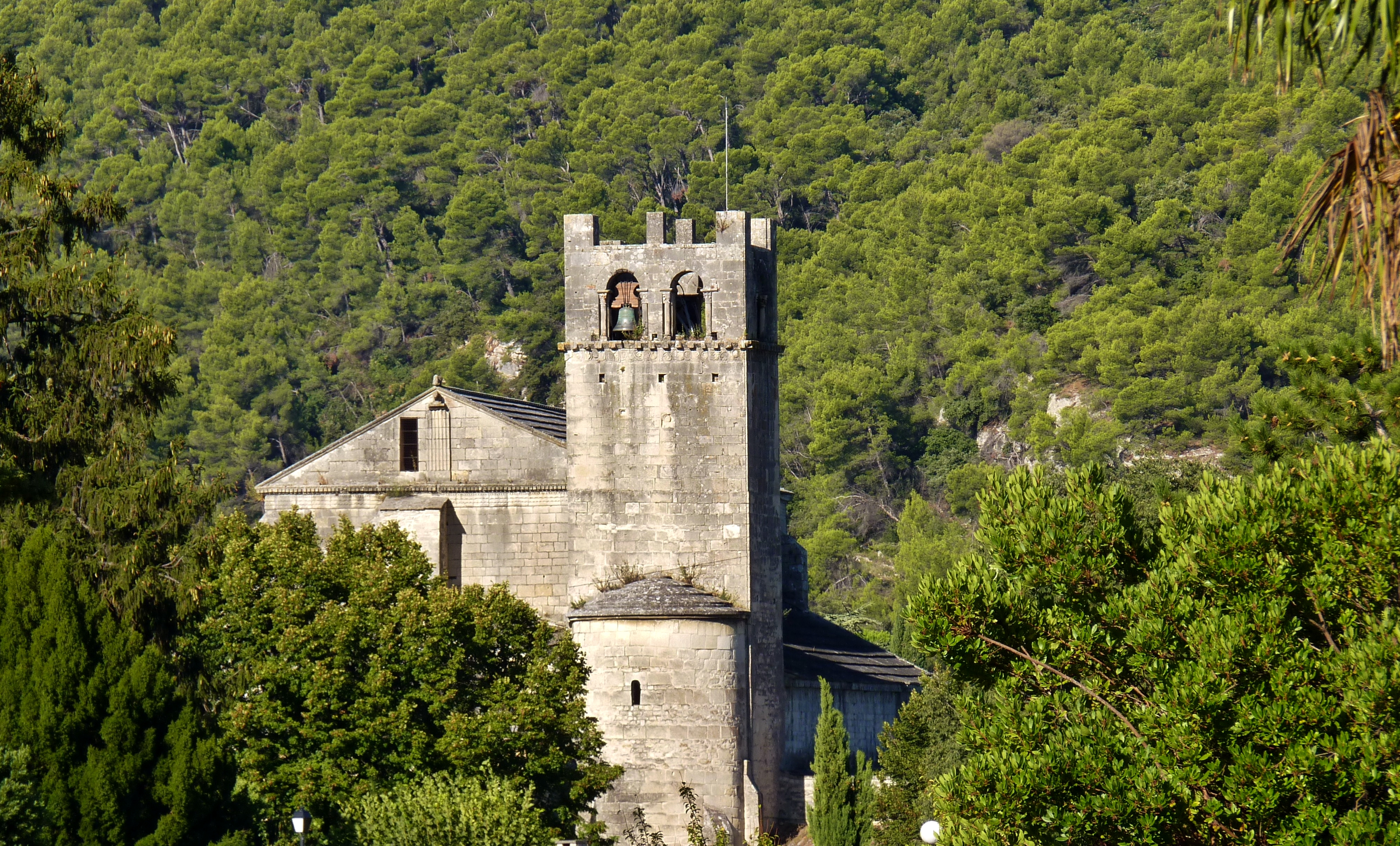 cathédrale côté clocher